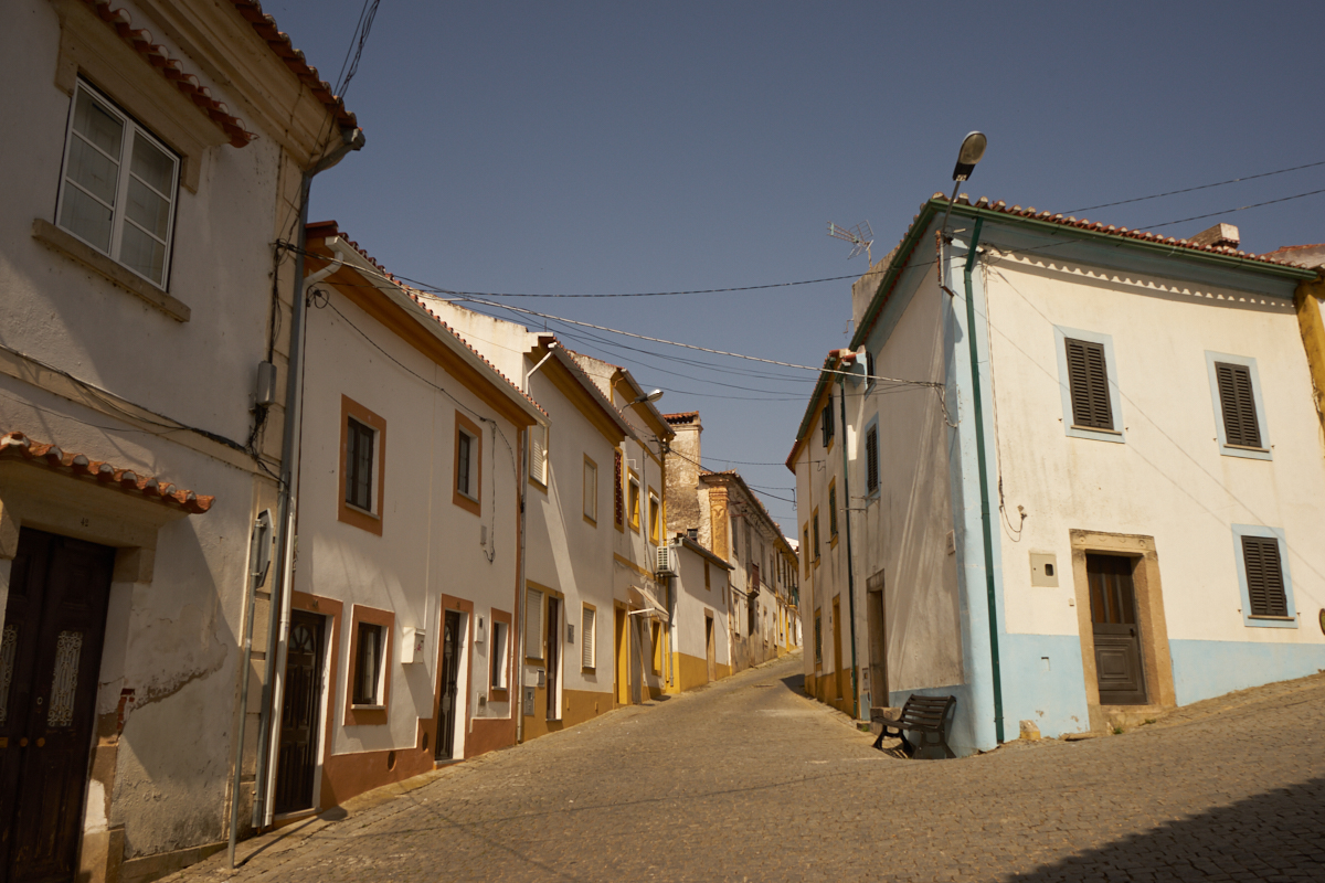 Portugal Sony A7 RAW FILE €29